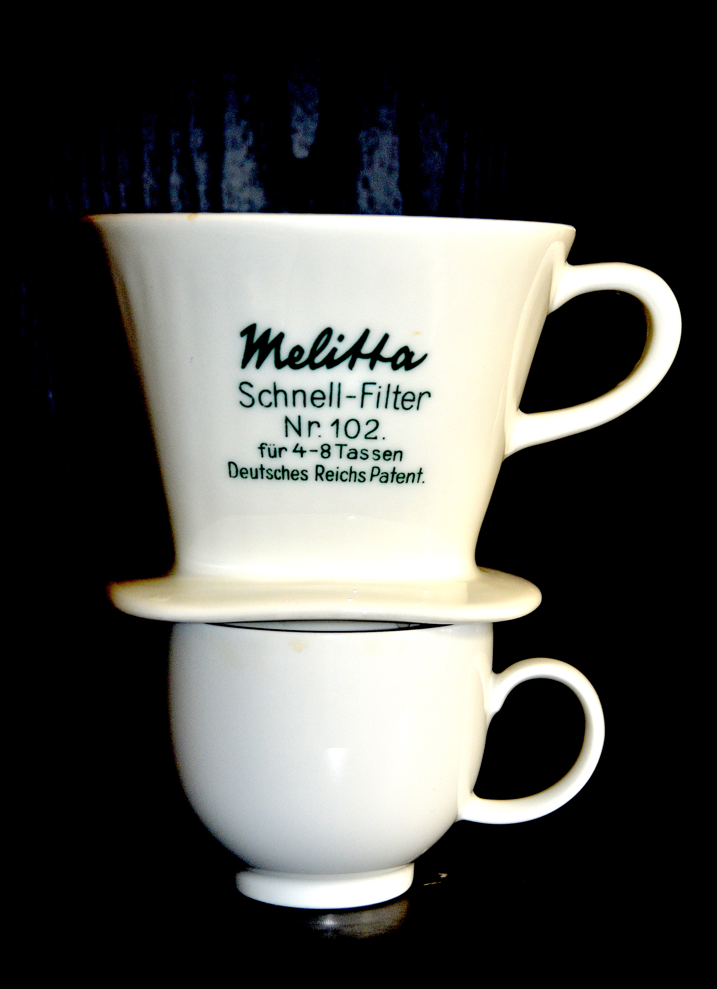 Melitta Kaffee-Filterhalter aus Keramik aus den 1930er Jahren